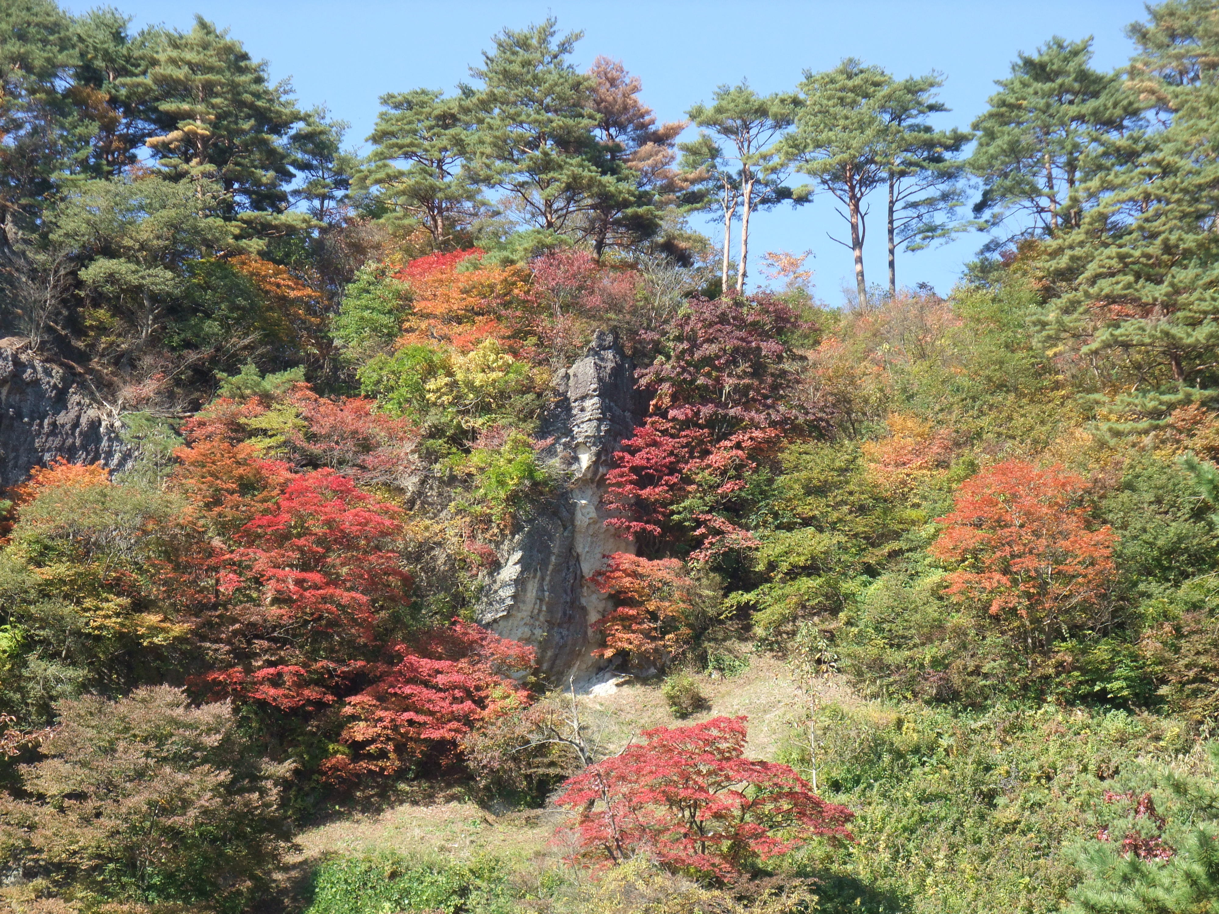 きみまち阪の紅葉(2012年10月27日)